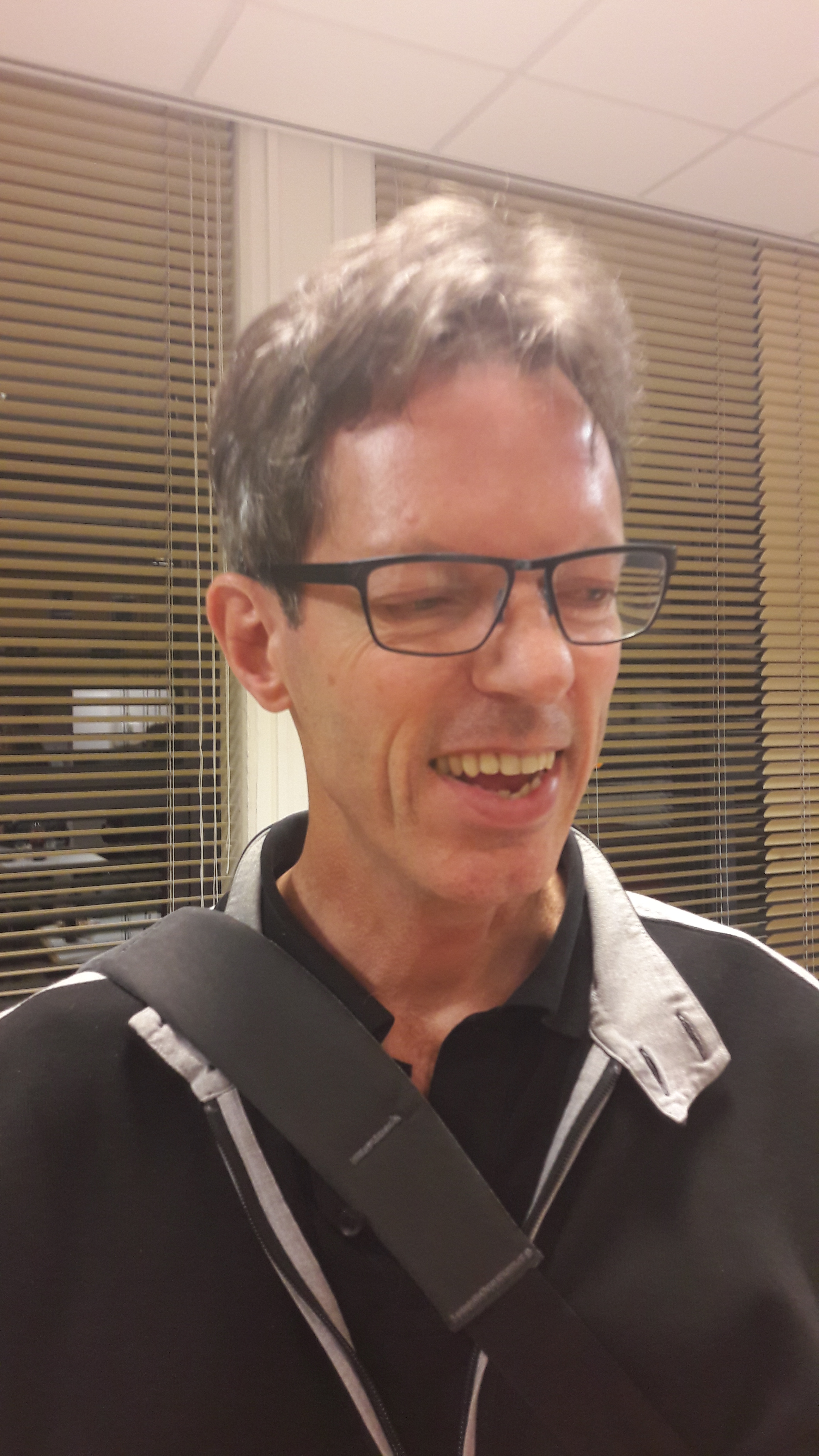 Portret van Harold Bekkering